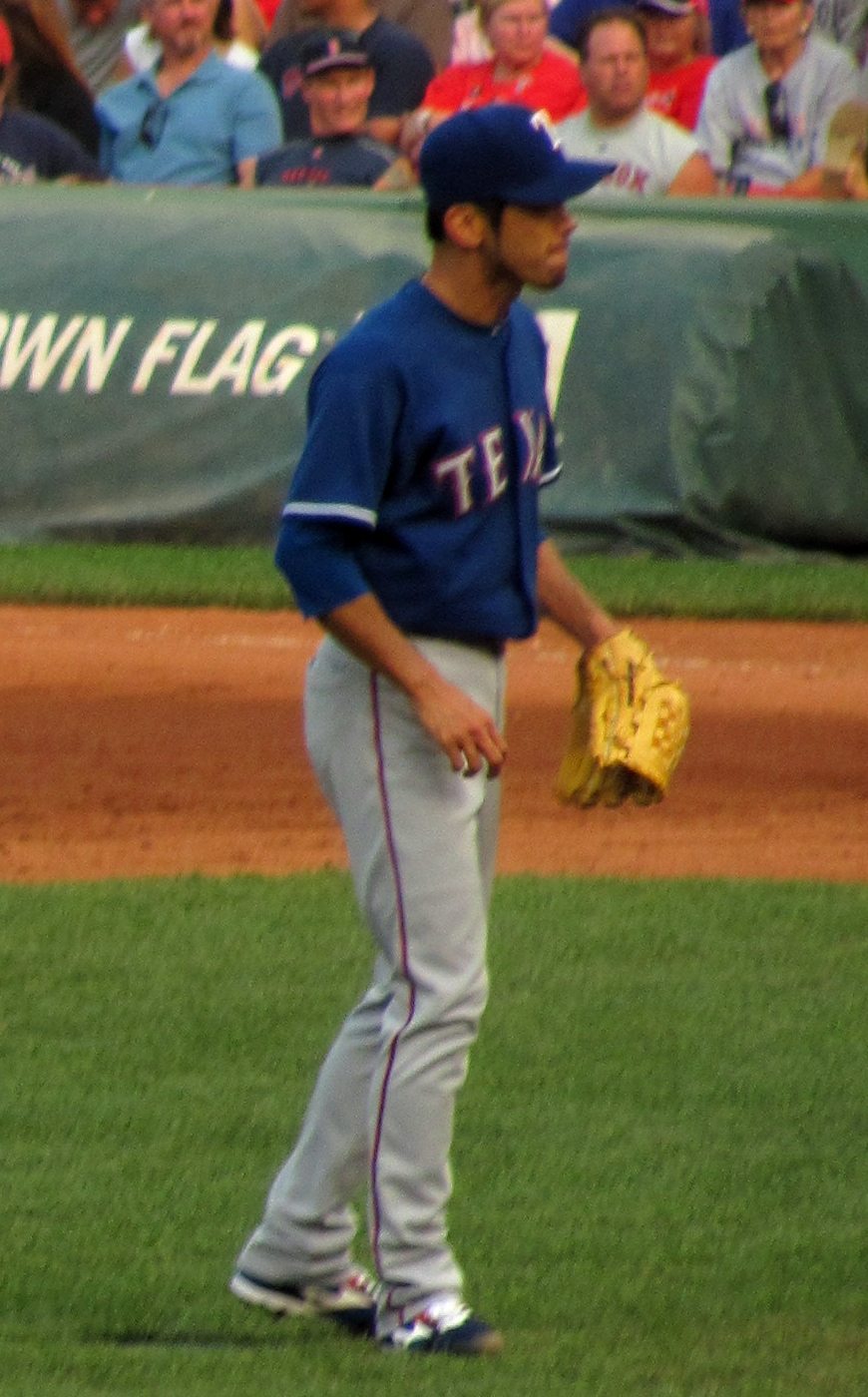 Yoshinori Tateyama